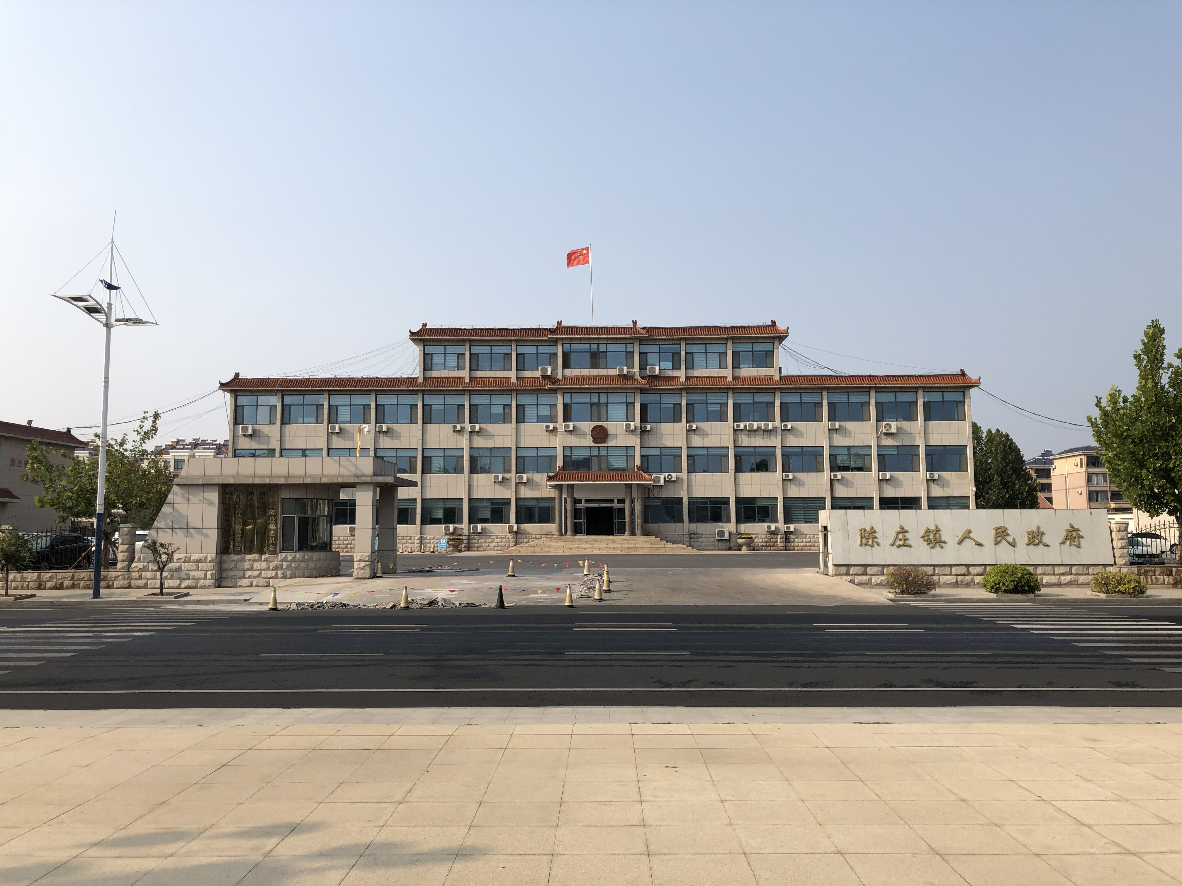 中文（中国大陆）: 陈庄镇政府